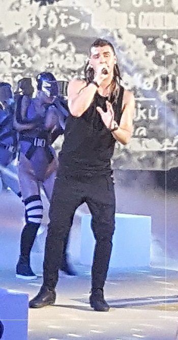 Polski piosenkarz Kamil Bednarek w trakcie występu podczas jesiennej konferencji ramówkowej TVN w 2017 roku.